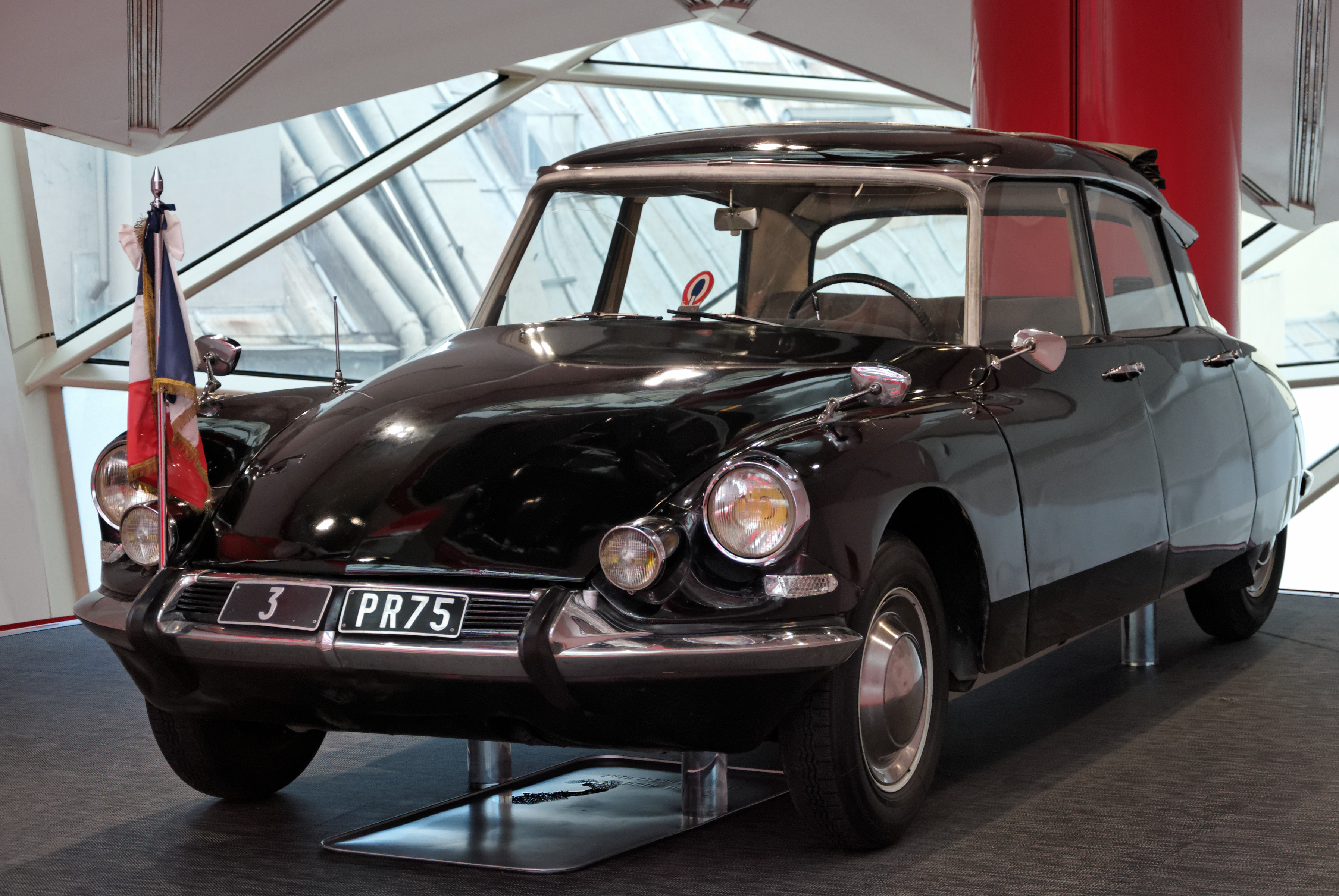 Une Citroën DS présidentielle de Charles de Gaulle datant de 1963, exposée à l'espace C42 à Paris en 2012.